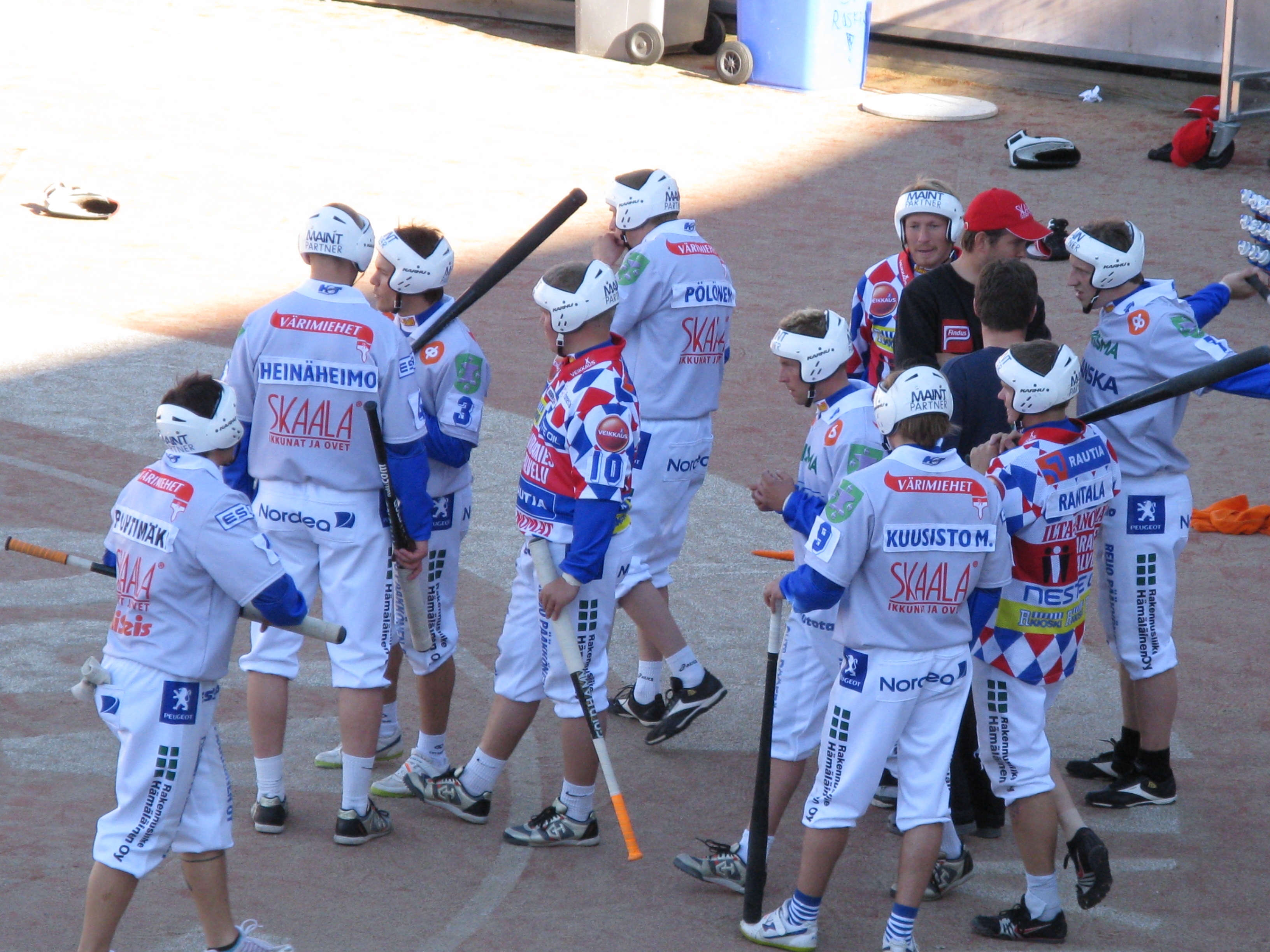 Description